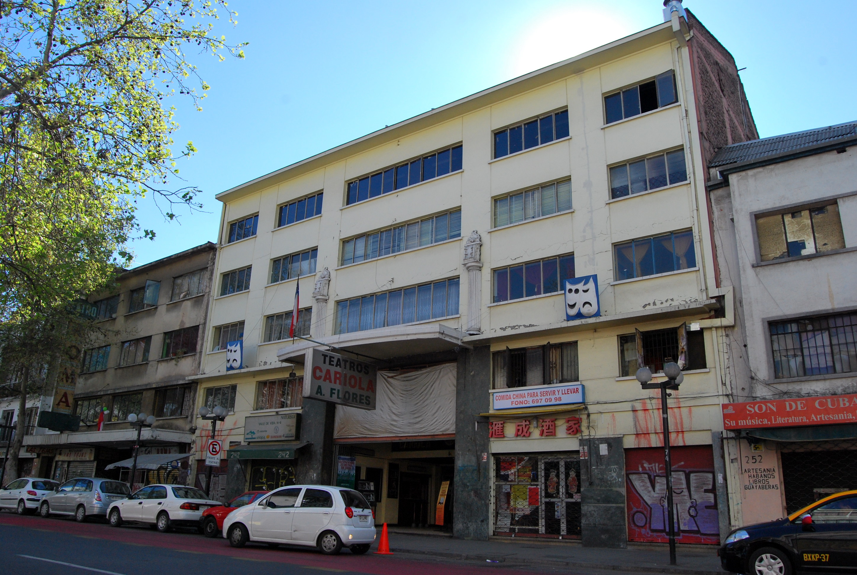 Teatro Cariola This is a photo of a national monument in Chile: 2223